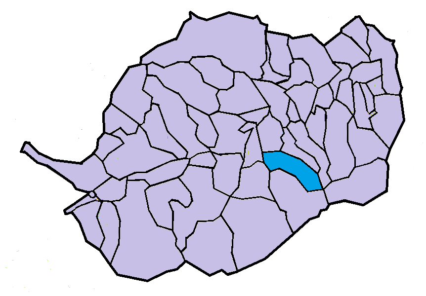 Vernet en el Conflent, a partir del mapa municipal del Conflent de lliure disposició adaptat al Nomenclàtor toponímic aprovat el 2007